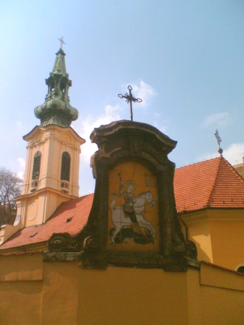 Pesti szerb templom (Budapest V. kerülete, Szerb utca 4.)